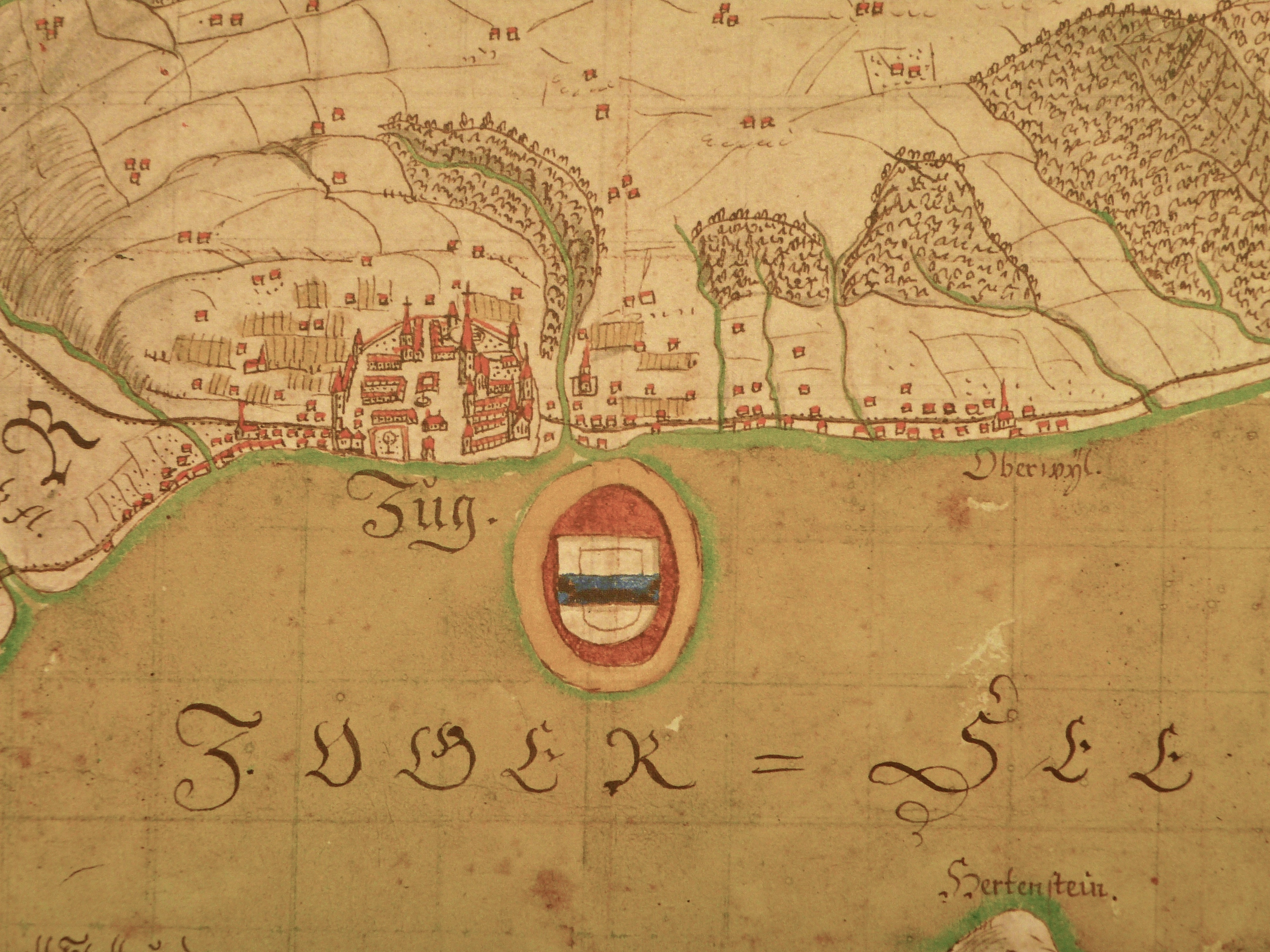 Hans Conrad Gyger: Zug auf der «Karte des Kantons Zürich aus dem Jahr 1667 in 56 Blättern von Hans Conrad Gyger».